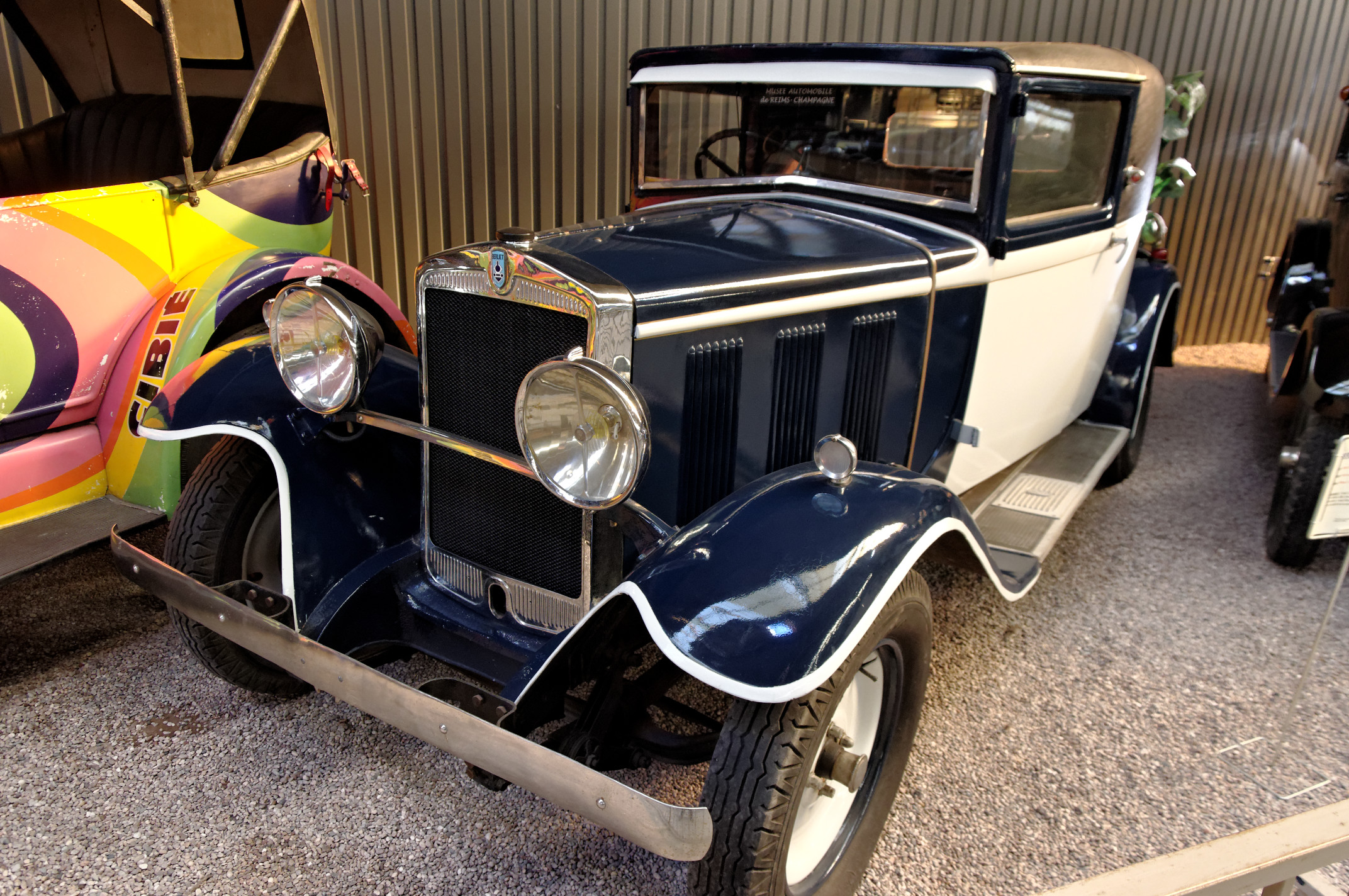 Berliet D 68 (VITS) (1928), Coupé 2 portes, 4 places, carrosserie Delage, 4 cyl. en ligne, soupapes latérales, 2000 cm3, 11 cv fiscaux, vitesse max. 80 km/h(Musée Automobile Reims Champagne, Reims, Marne, France)